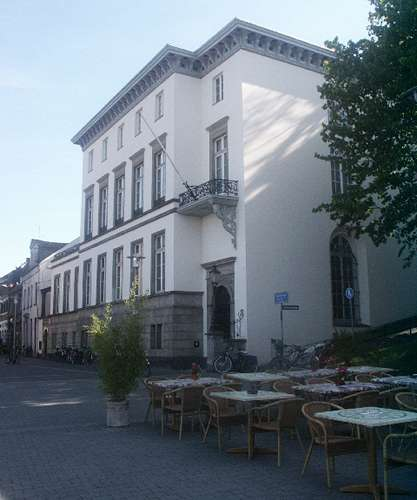 Haus Koekkoek, Kleef / Kleve